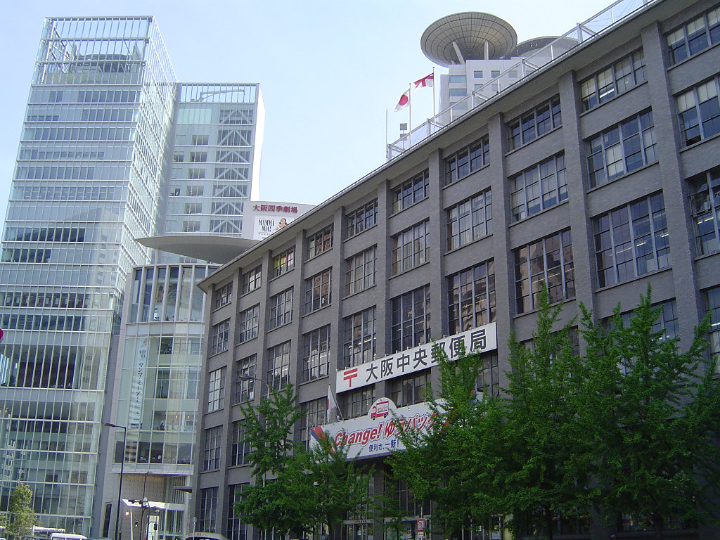 大阪中央郵便局